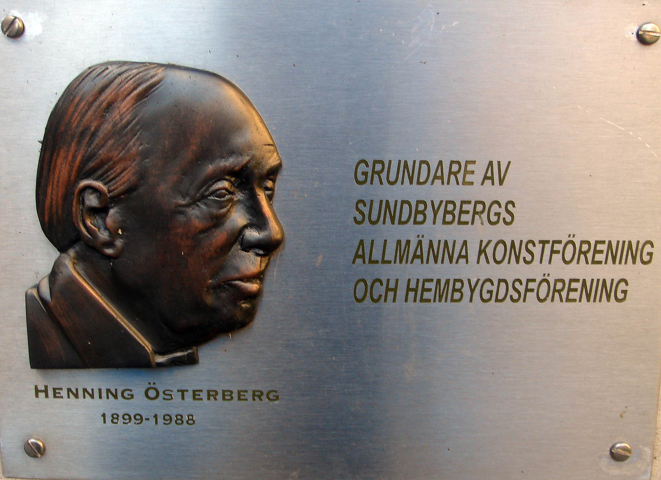 Minnesplakett över Henning Österberg. Reproduktion från foto. Placerad vid trappan vid Tallbostigen i Sundbyberg